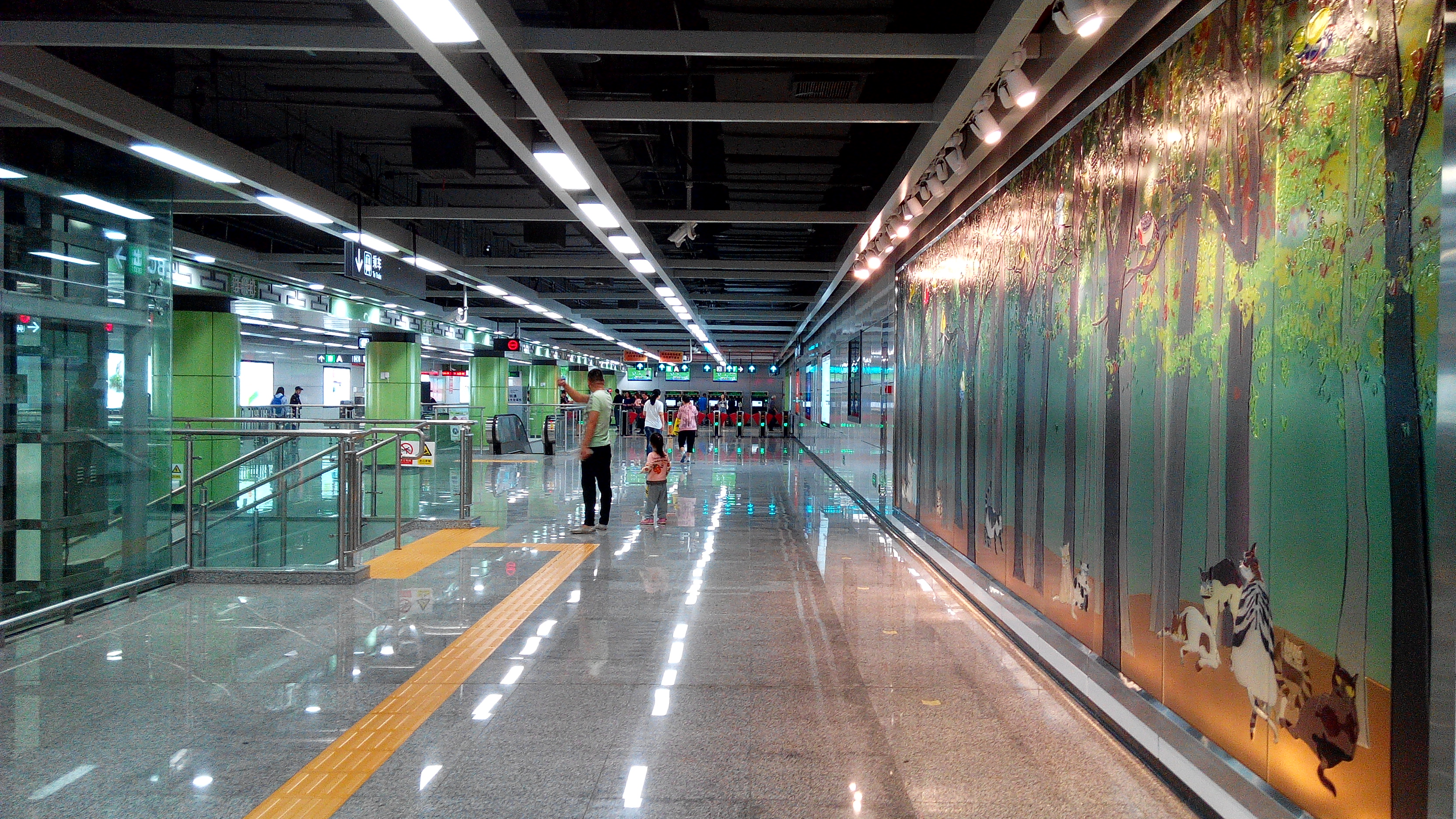 深圳地铁9号线 下梅林站大堂